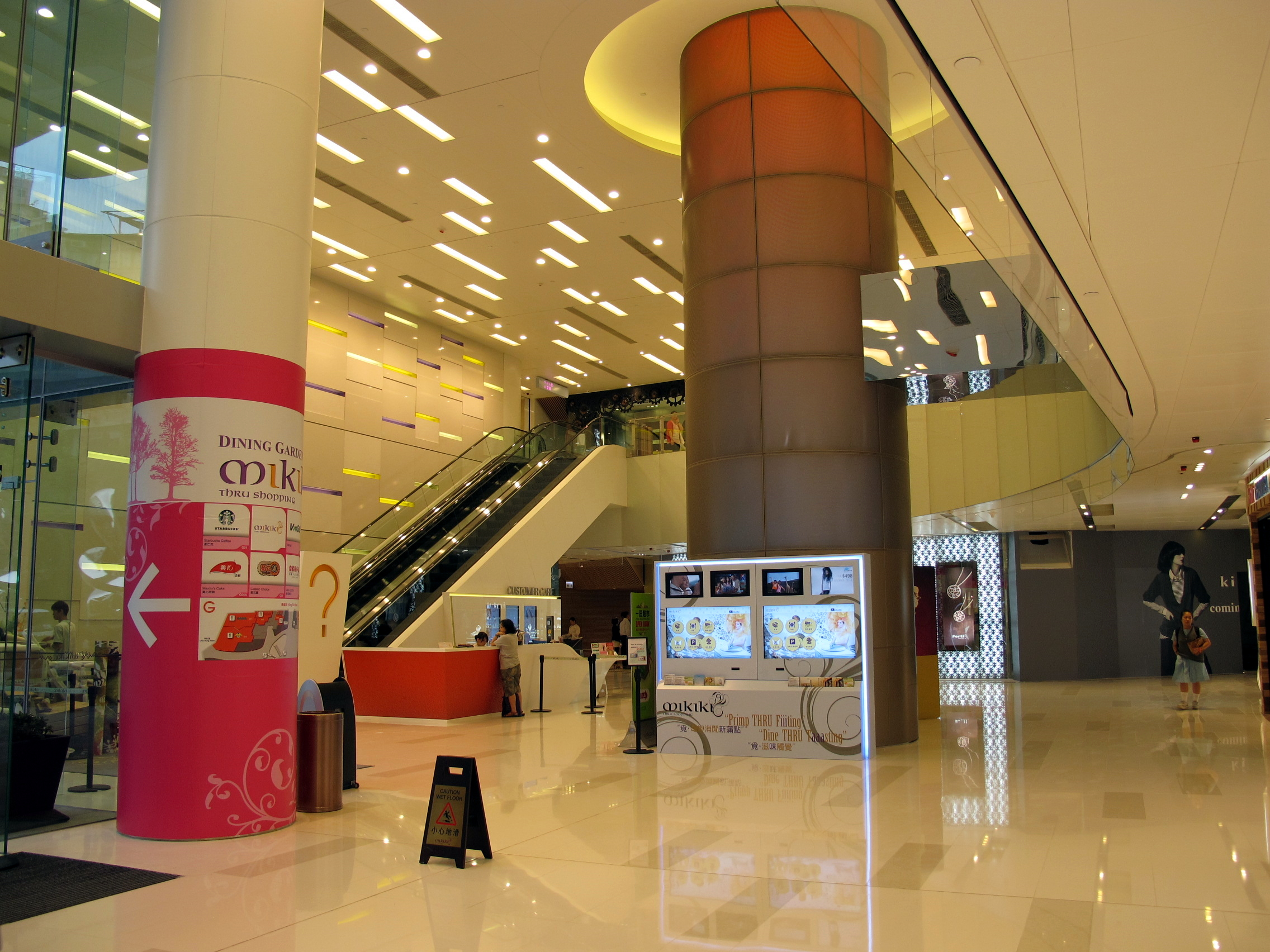 Mikiki Enterance Void View1